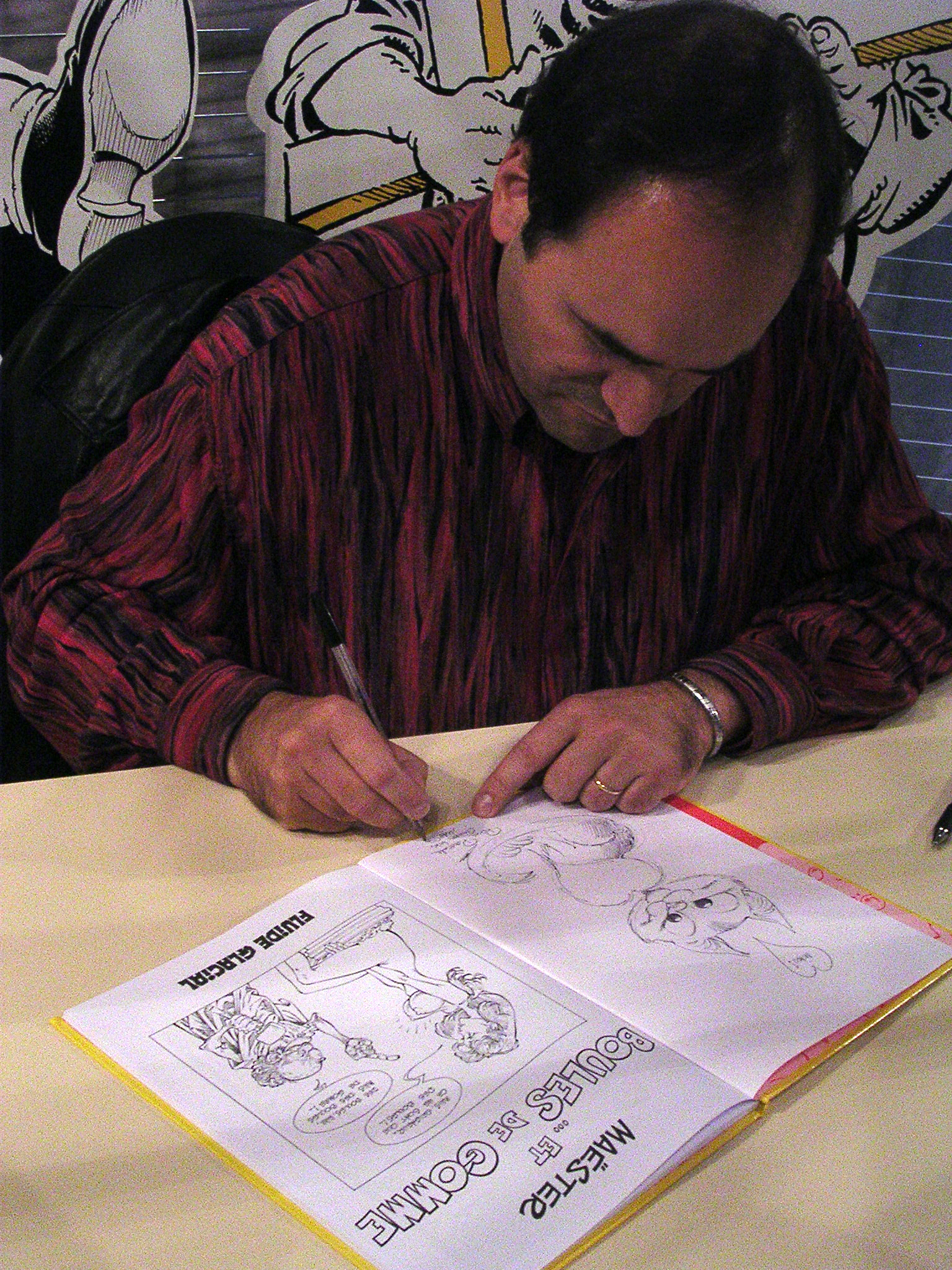 Maëster, auteur de bandes dessinées, lors du festival de la BD de Chambéry (France), le dimanche 9 octobre 2005.